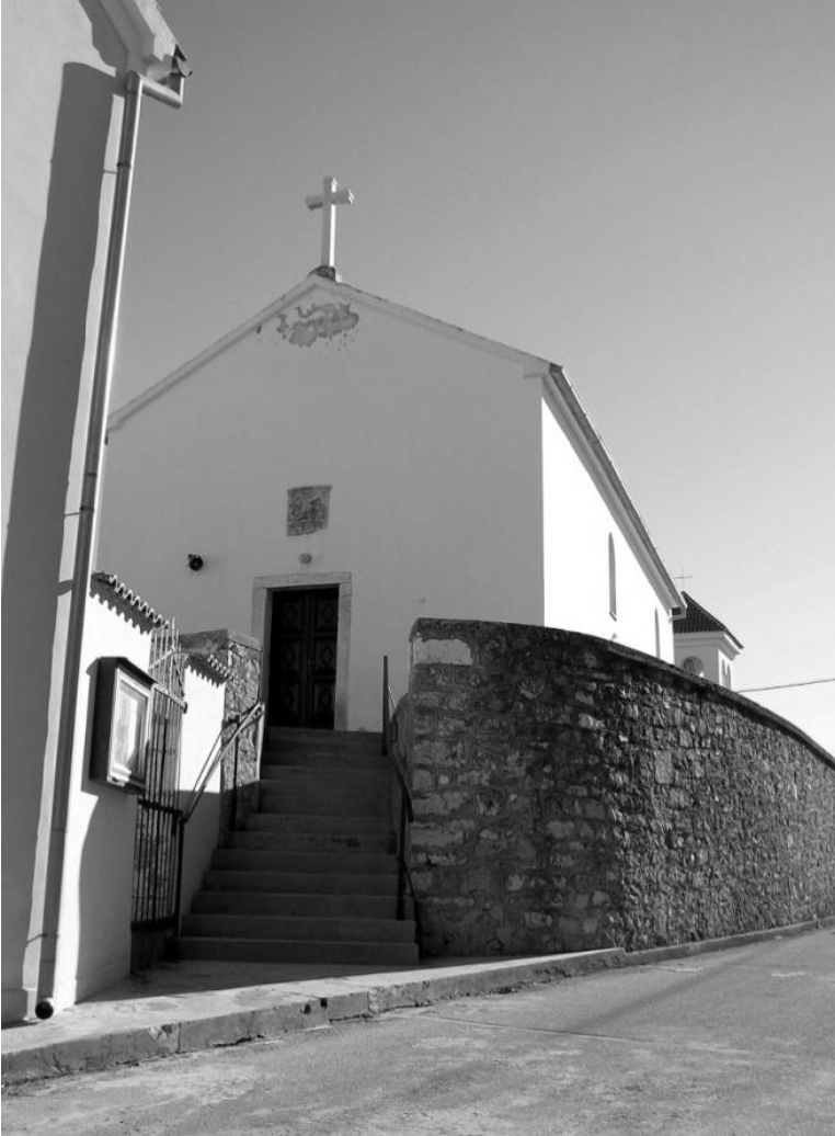 Crkva sv. Šimuna i Jude Tadeja na Bokanjcu izgrađena 1769. godine usred starog groblja na mjestu ruševne crkve sv. Šimuna pravednika